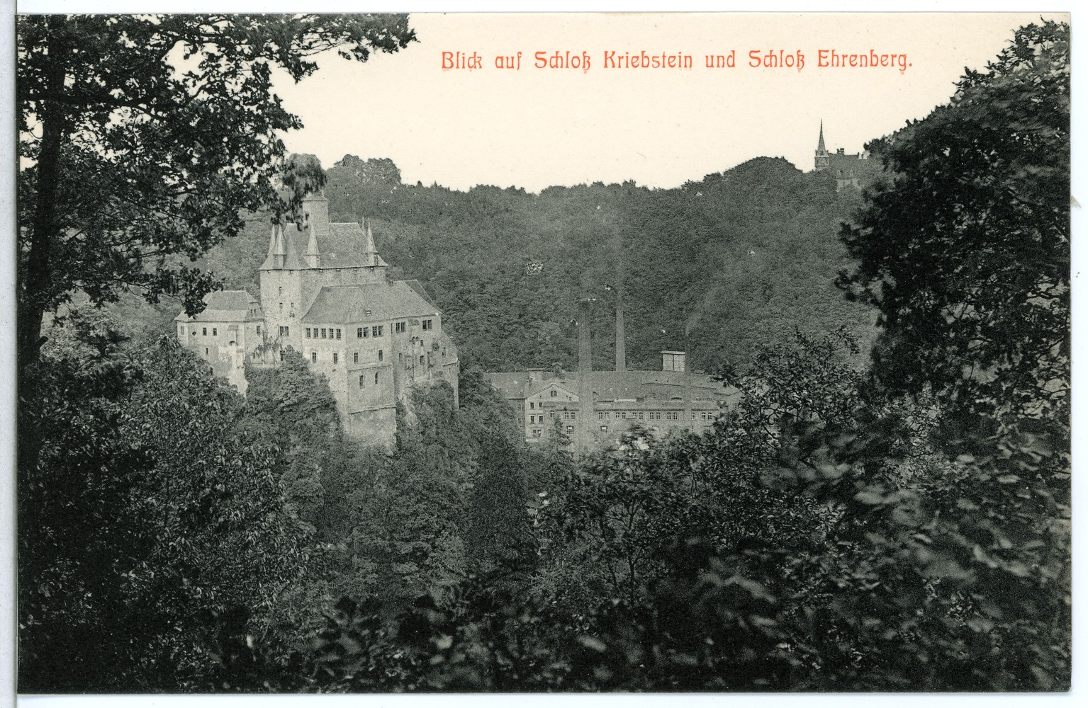 Kriebstein; Blick auf Schloß Kriebstein und Ehrenberg This postcard is from publisher Brück & Sohn in Meißen ( postcard has a unique number 12935 and is available in a higher resolution at the publisher. This images was uploaded in a cooperation project between Wikipedians and the publisher.